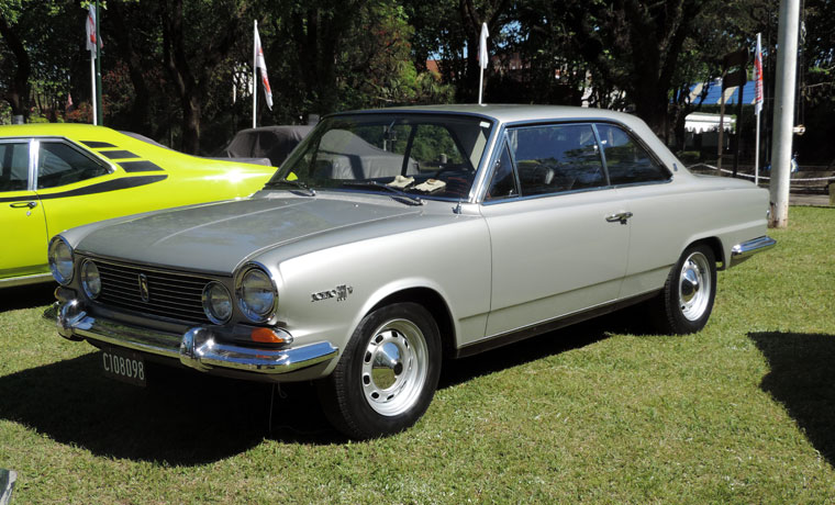 Torino 380 W 1967, un auto fabricado en Argentina en los años 60, y cuyo legado sigue vigente incluso hoy en dia